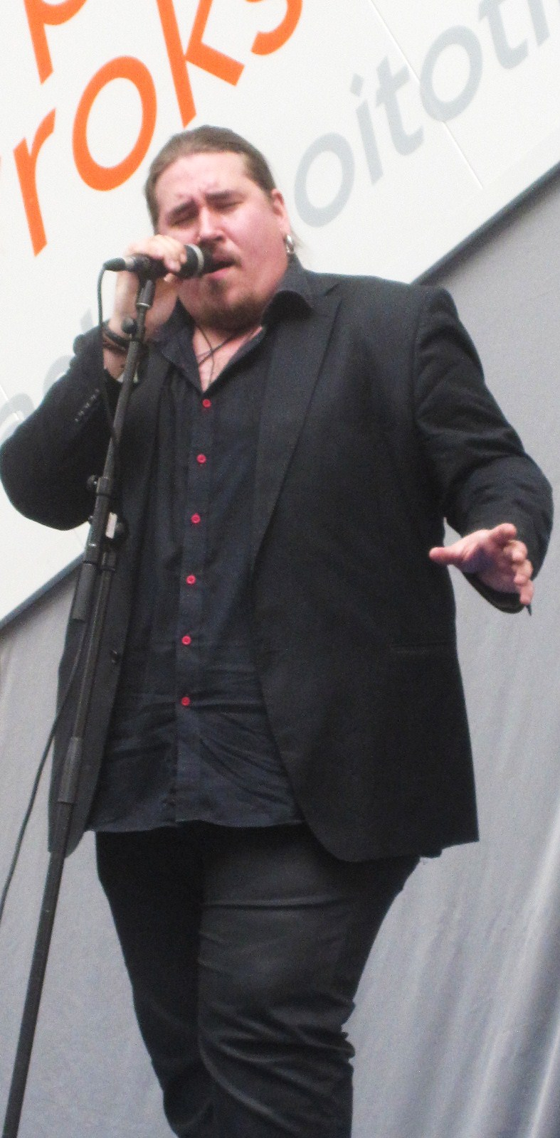 Suomalainen laulaja Antti Railio (s. 1984) esiintymässä Kempeleen Kauppakeskus Zeppelinissä 14. syyskuuta 2013.